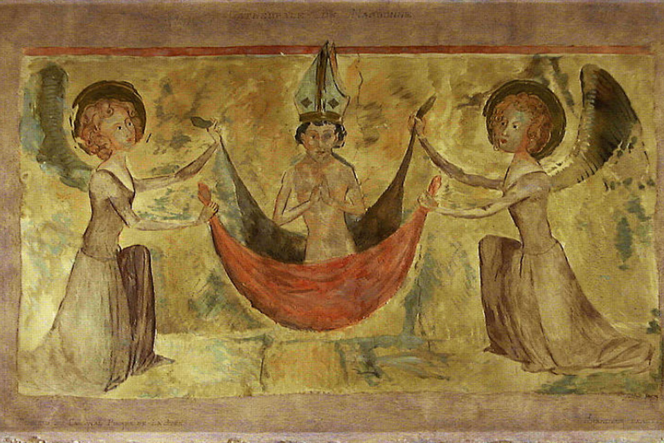 Cathédrale Saint-Just de Narbonne (Aude) - fresque - Cardinal Pierre de La Jugie